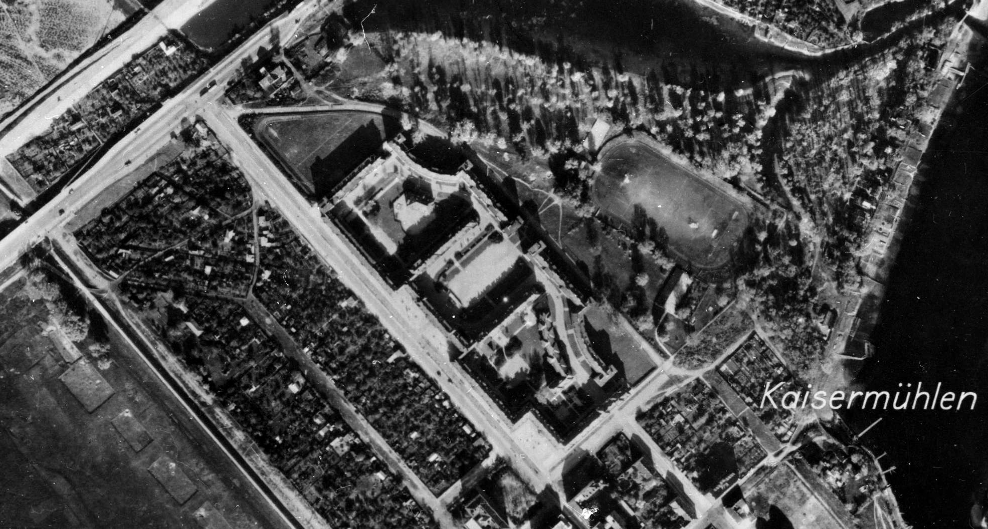 Goethehof in Wien, Luftbild von 1938